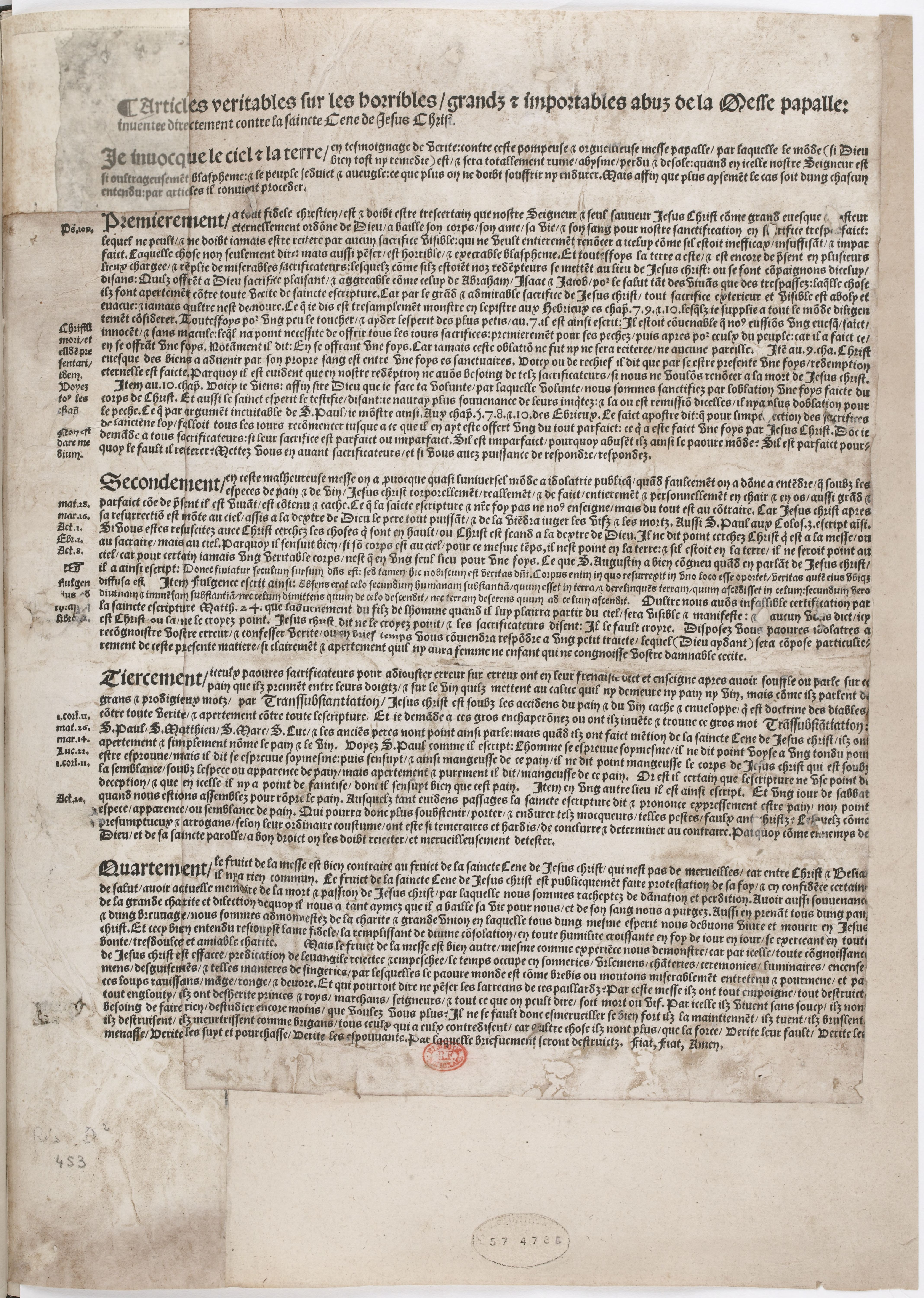 Antoine Marcourt, Articles veritables sur les horribles, grandz et importables abuz de la messe papalle, inventee directement contre la saincte Cene de Jesus-Christ, Neuchâtel, 1534. Un exemplaire des placards au cœur de l'affaire des Placards en 1534. Conservé à la Bibliothèque nationale de France, à Paris.